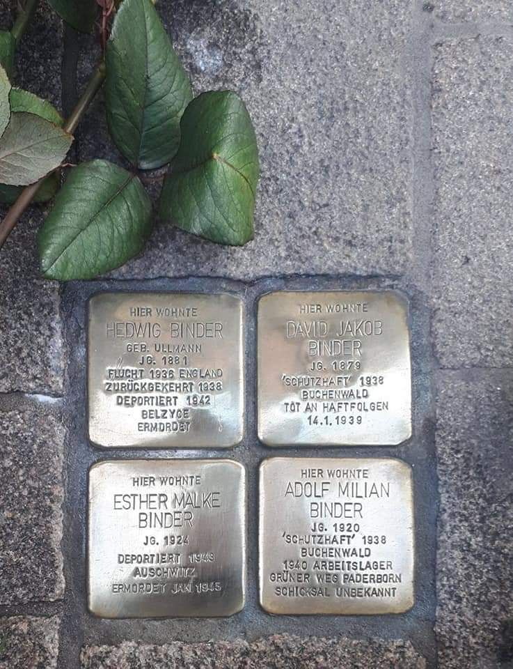 Stolpersteine in der Breiten Straße 2 vor dem ehemaligen Kaufhaus Binder, gewidmet der Familie Binder